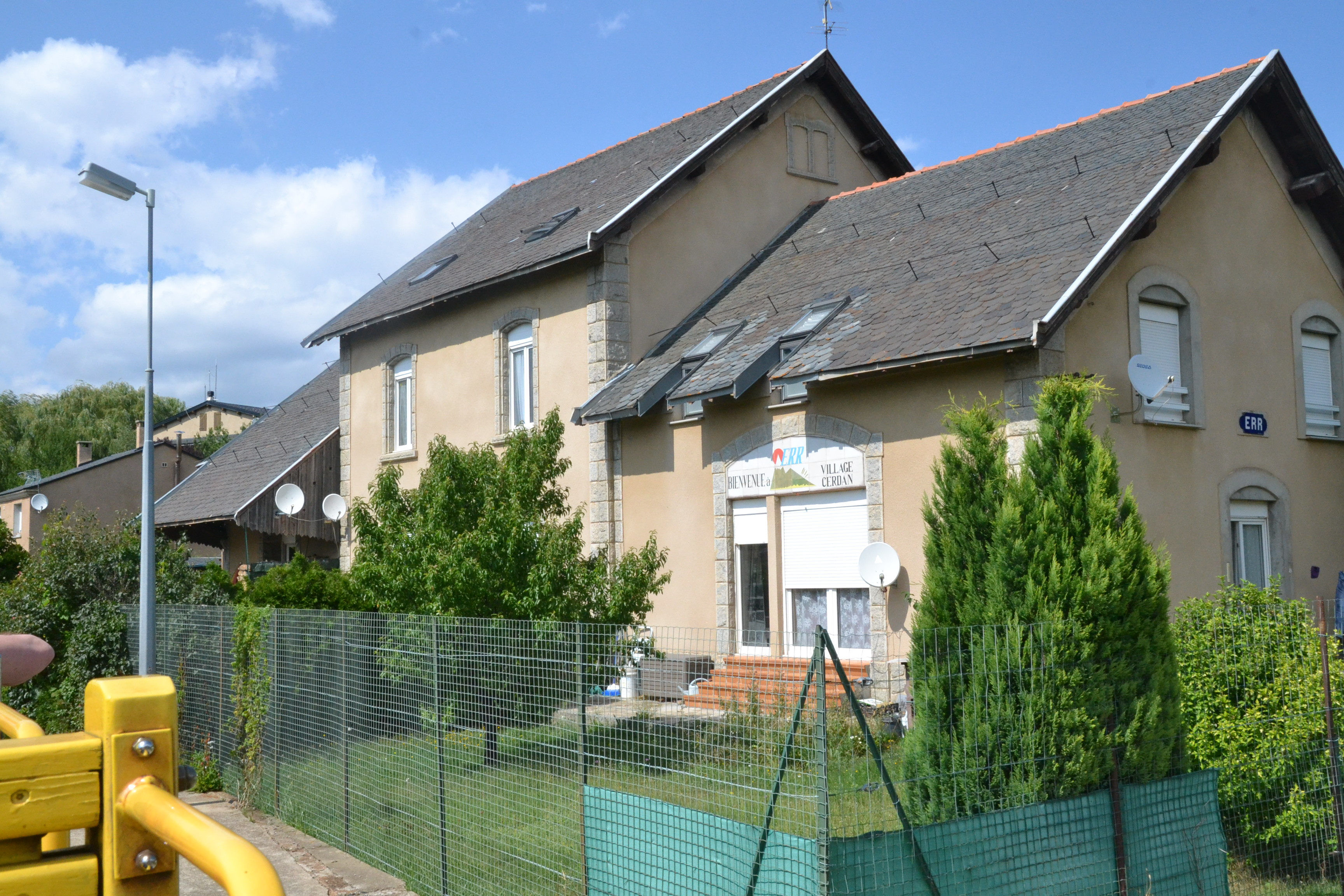 Bâtiment voyageurs historique de la gare d'Err (Pyrénées-Orientales, France).